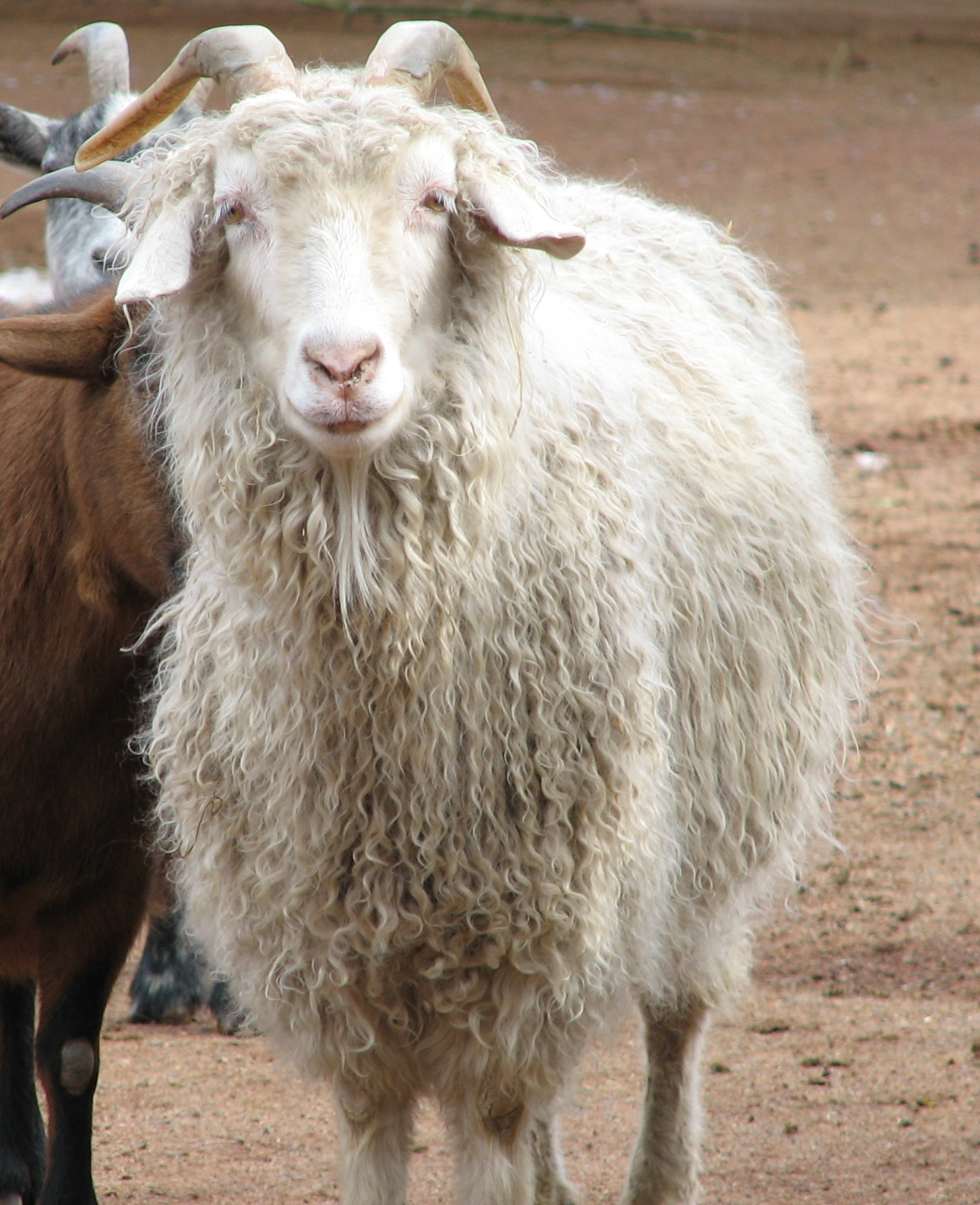 Angora Goat